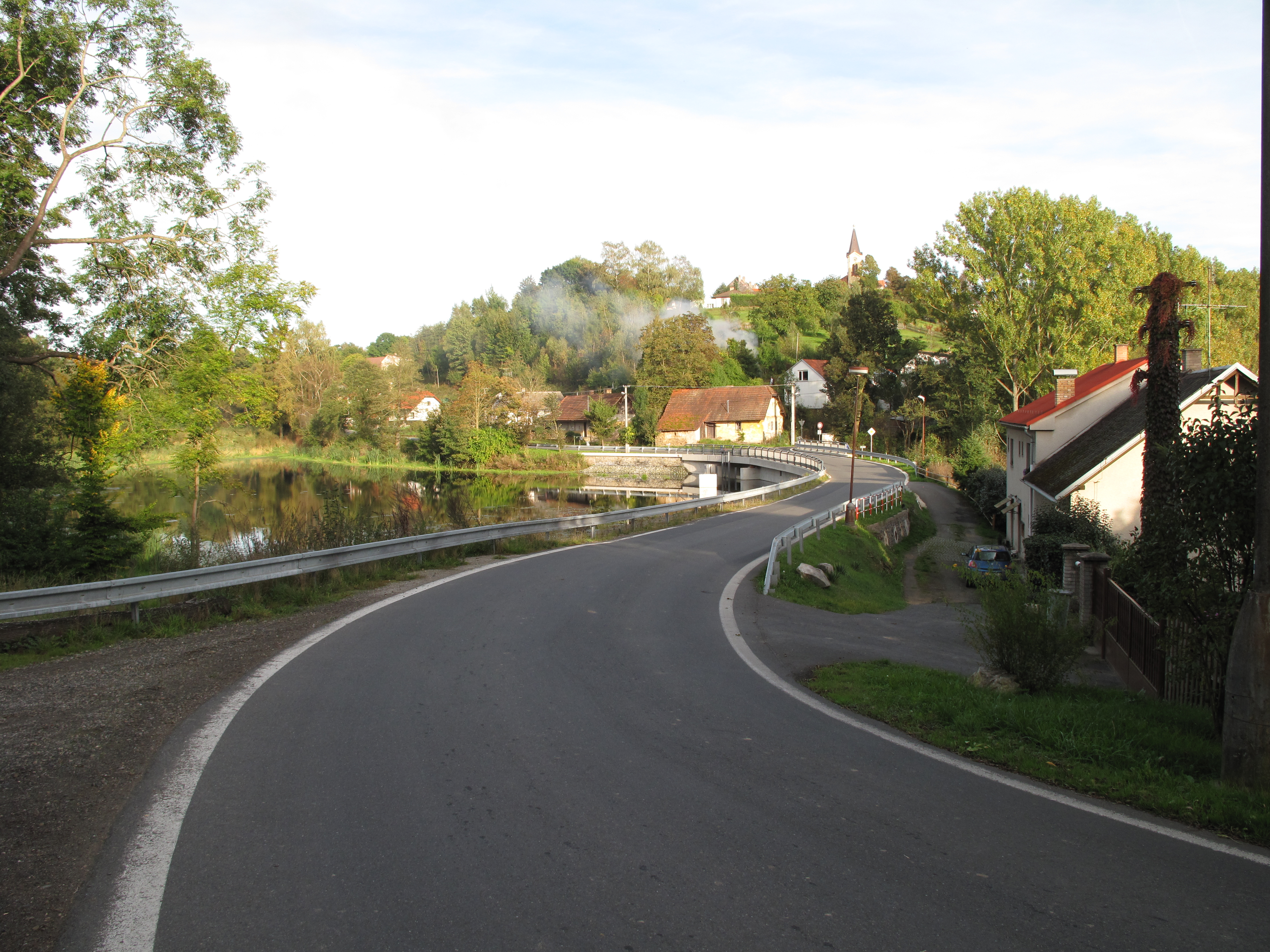 Zatáčka v Čestíně. Okres Kutná Hora, Česká republika.